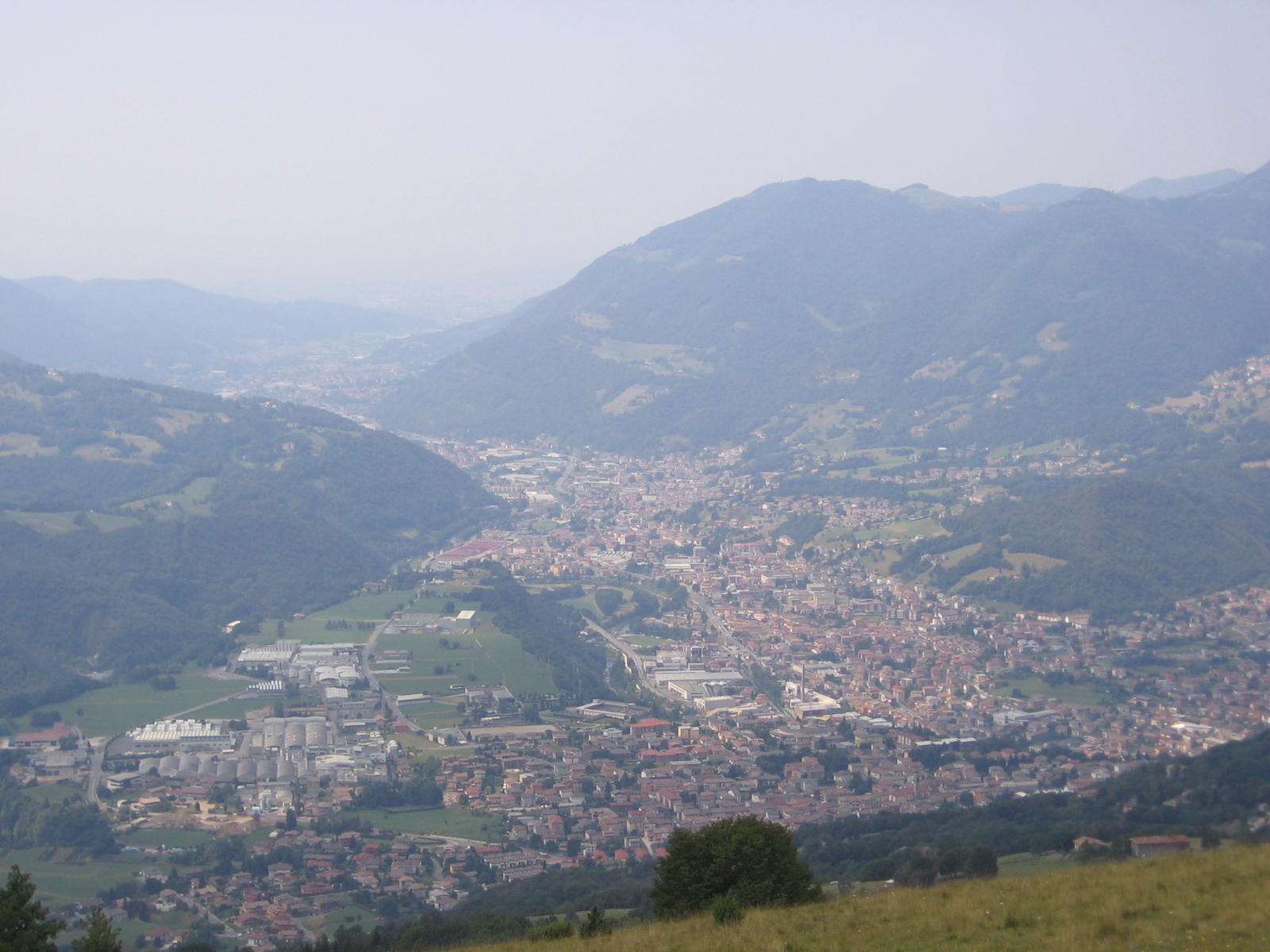 Valle Seriana, Bergamo, Italia